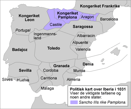 Bildet er laget og utgitt til offentlig eiendom av Bruker:Elisabethd.